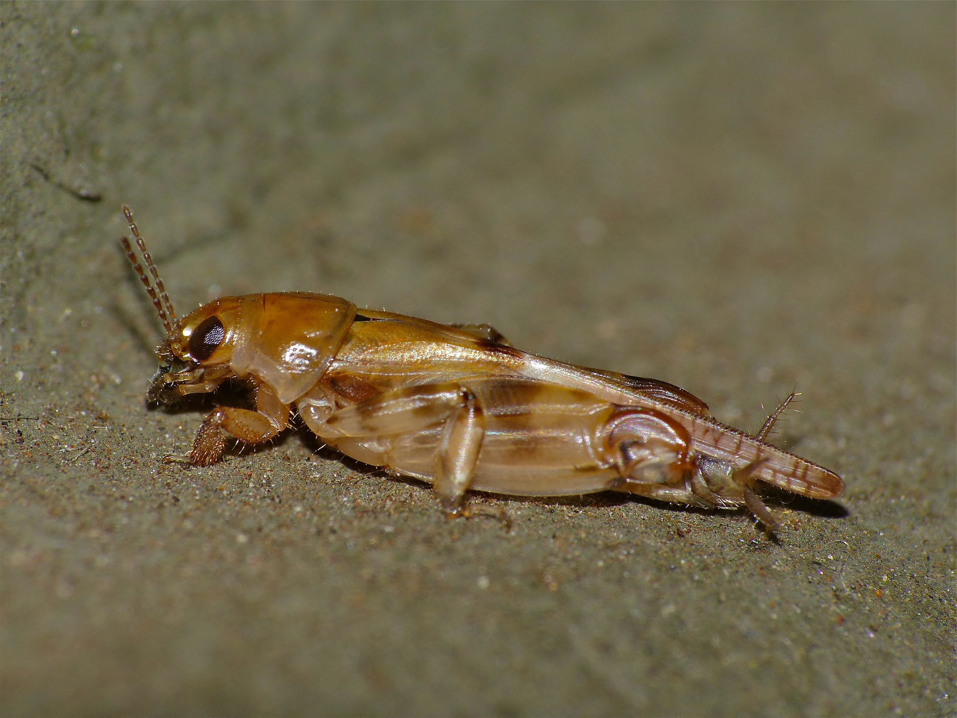 Safari Tent N°27, Tamboti Tented Camp, Kruger NP, SOUTH AFRICA